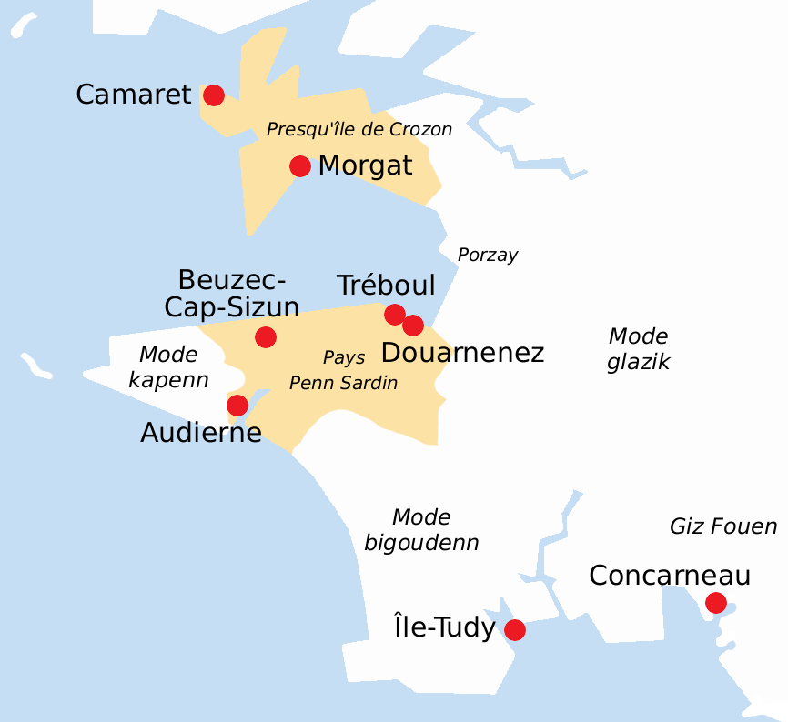 Sources : René-Yves Creston, Le Costume breton, Champion, 1993, p. 116-121, et cartes 36-49. Mikael Bodlore-Penlaez, Divi Kervella, « Modes. Cœur de l'âme bretonne », Atlas de Bretagne, Coop Breizh, 2011, p. 68.